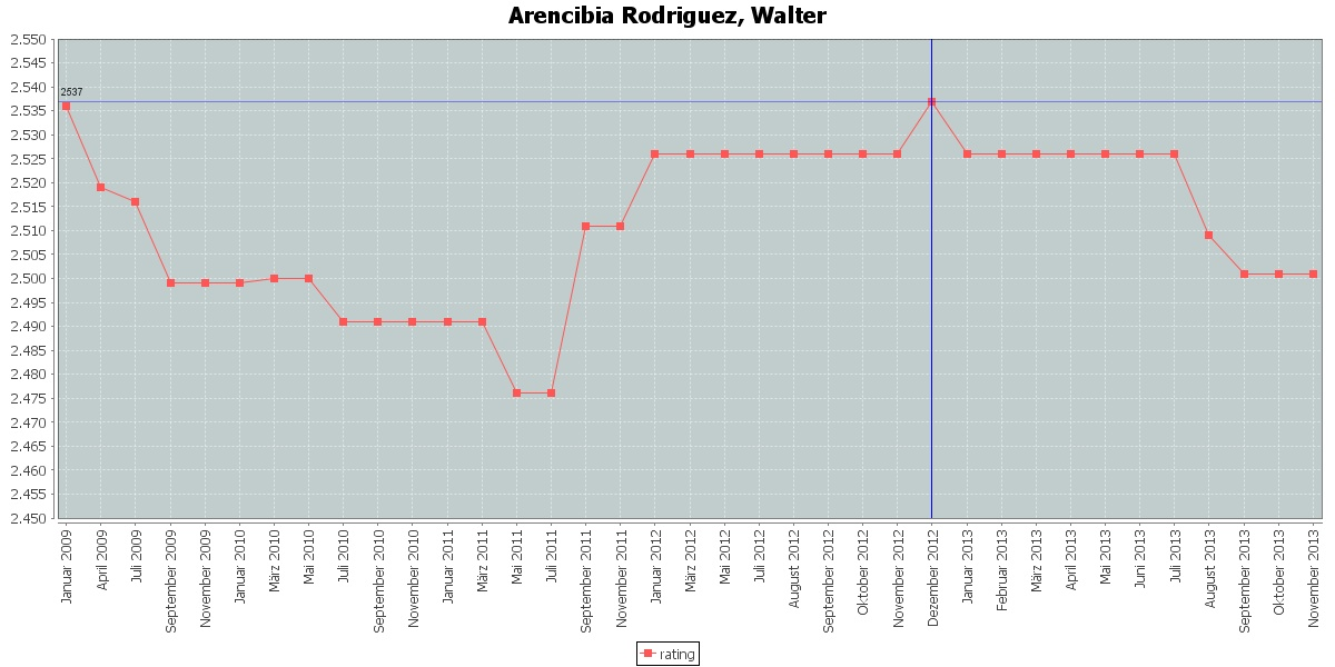 Аренсибия, Вальтер (род. 1967) — кубинский шахматист, гроссмейстер (1990).